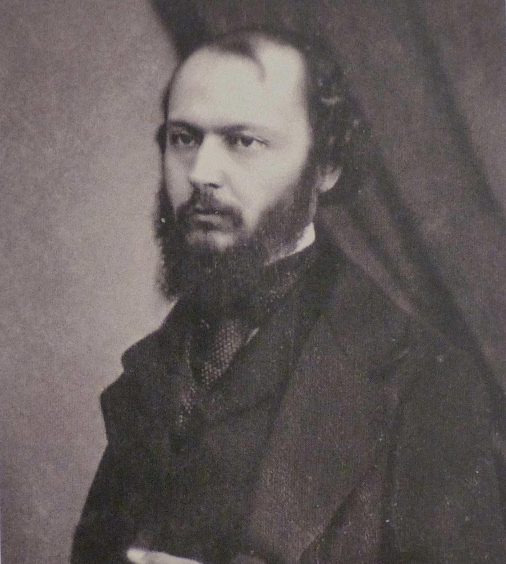 Photographie de Pierre Bossan